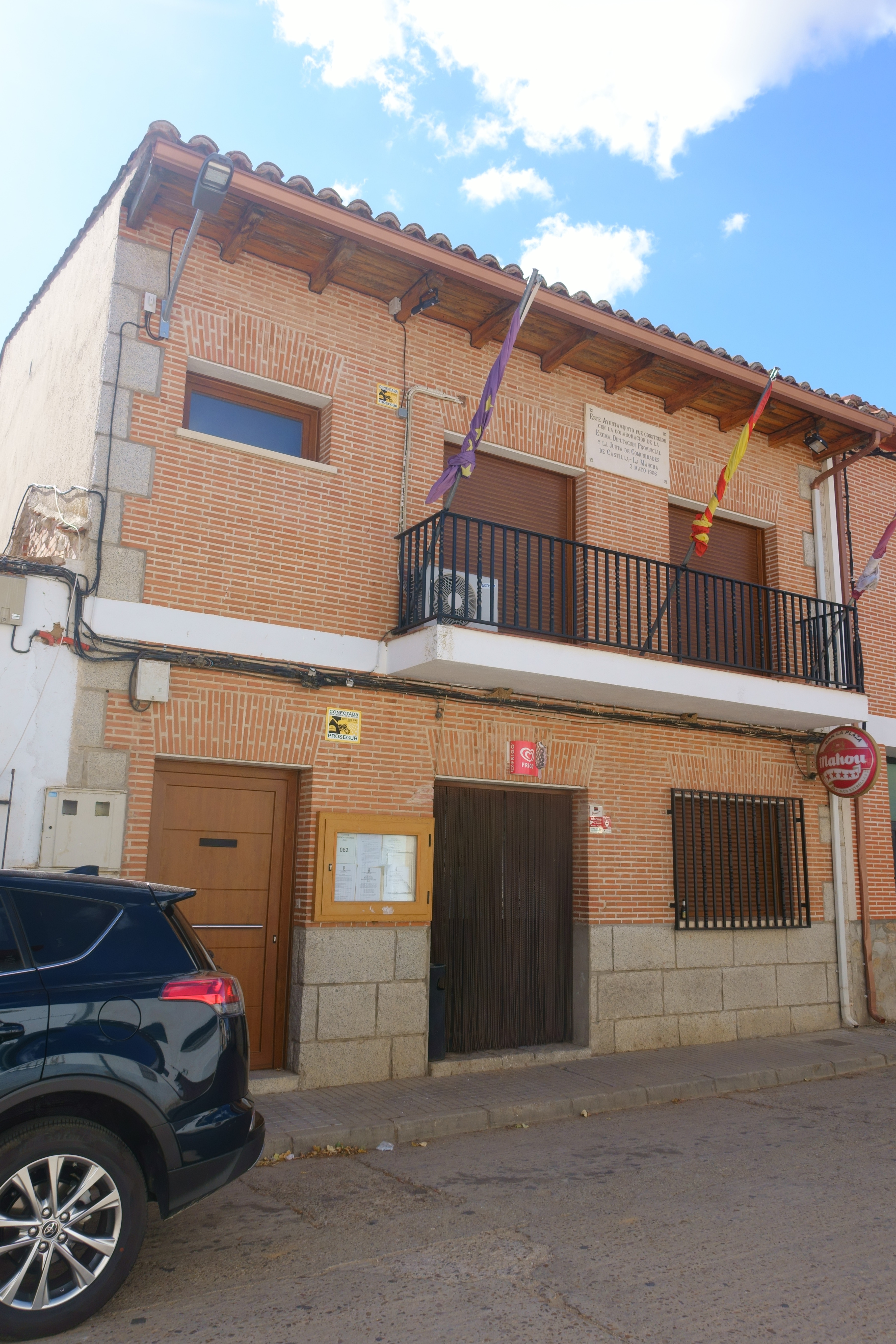 Casa consistorial de Valdenuño Fernández (Guadalajara, España).